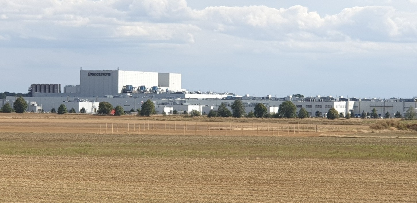 Stargard. Koncern Bridgestone